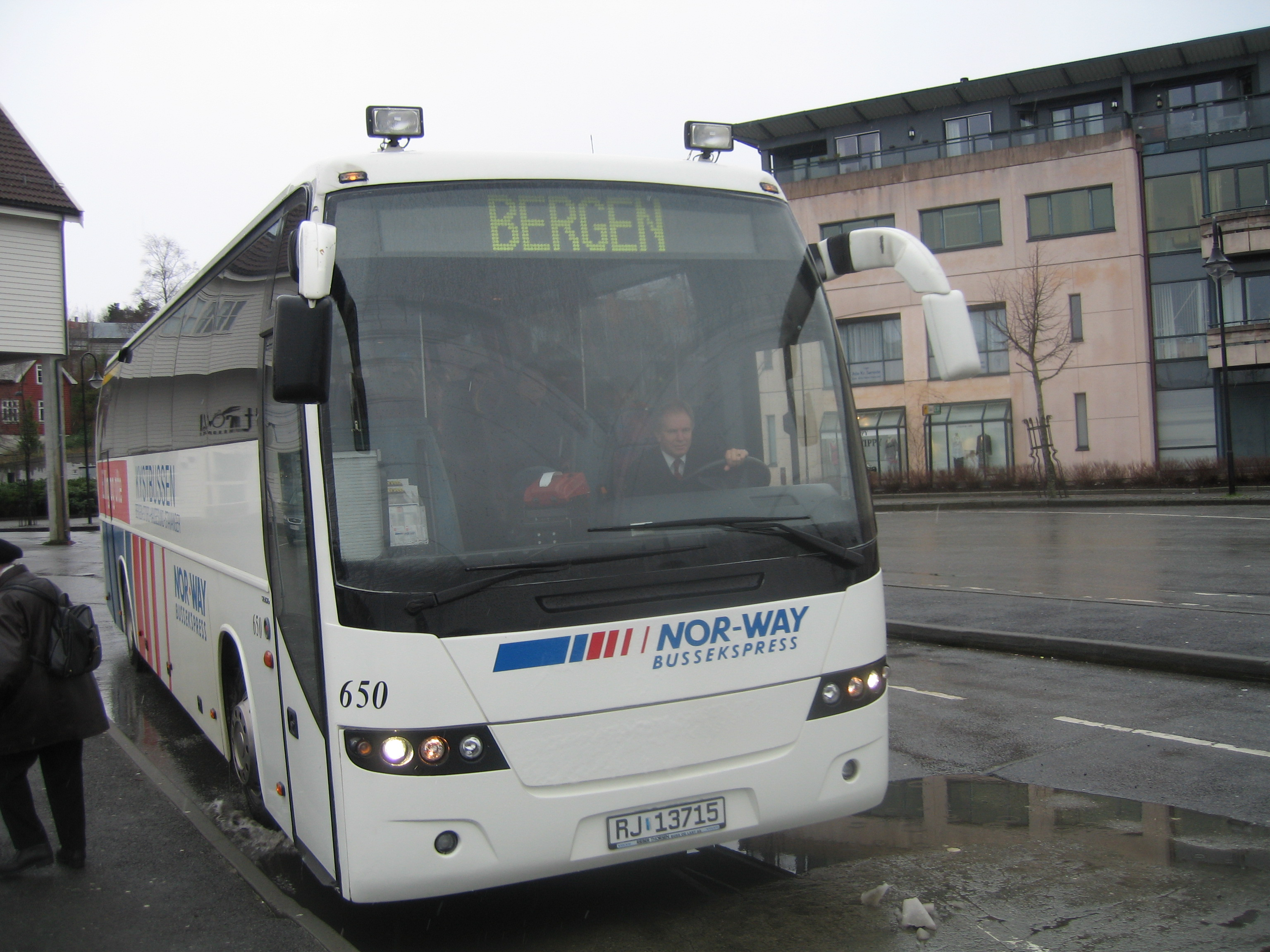 Kystbussen på stoppestaden på Leirvik på Stord.